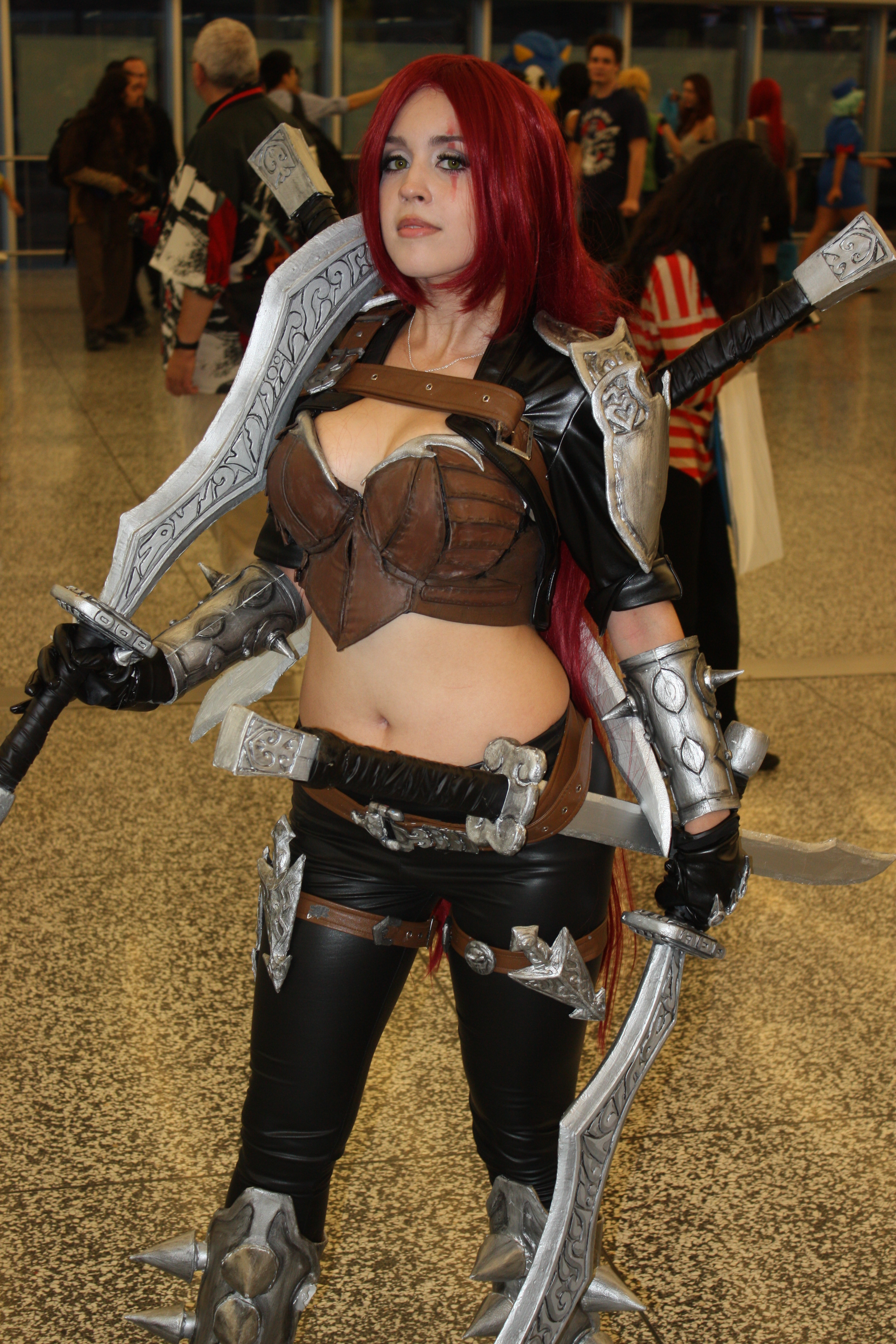 Otakuthon 2014: Katarina